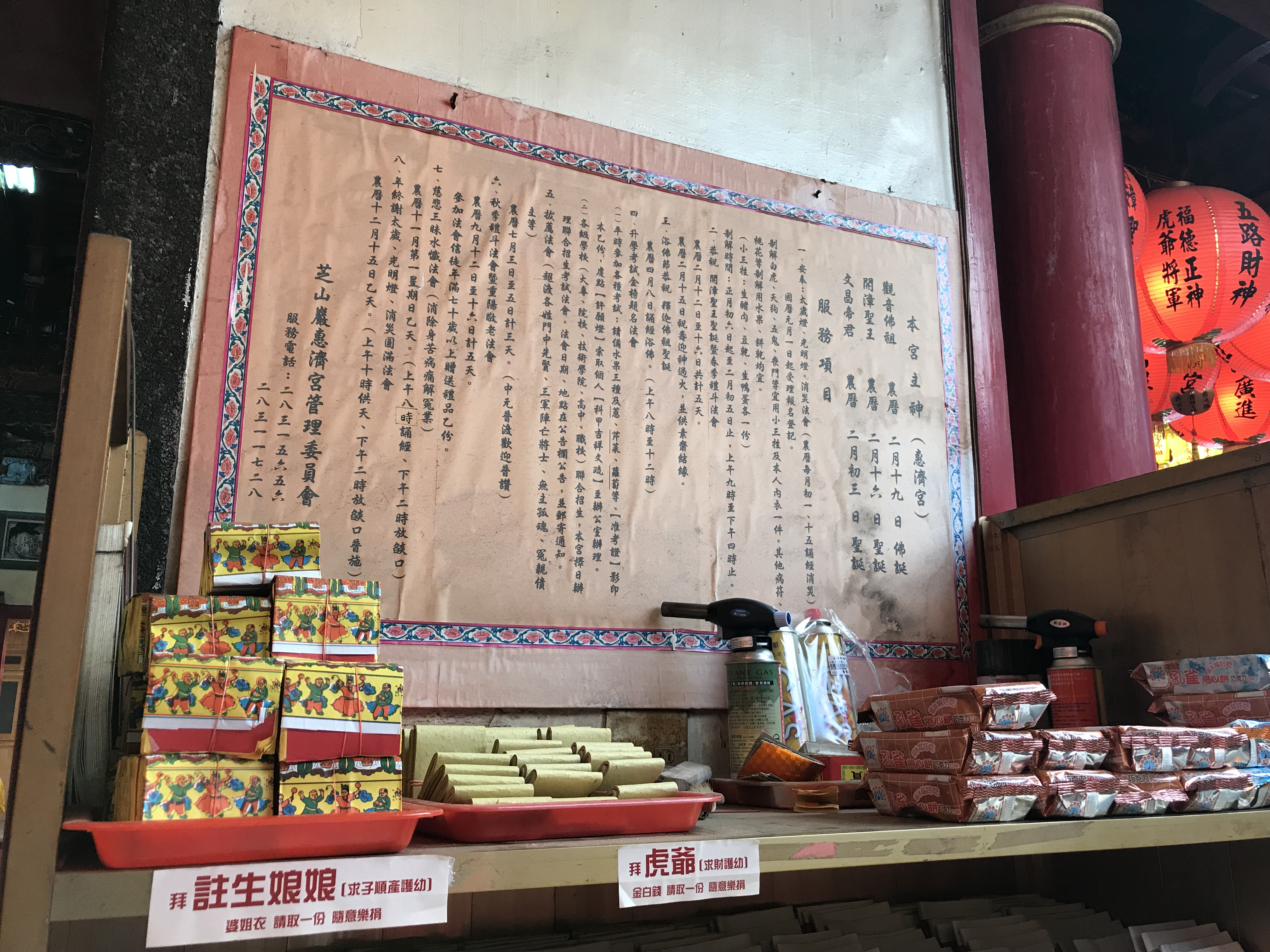 芝山巖惠濟宮祀神表